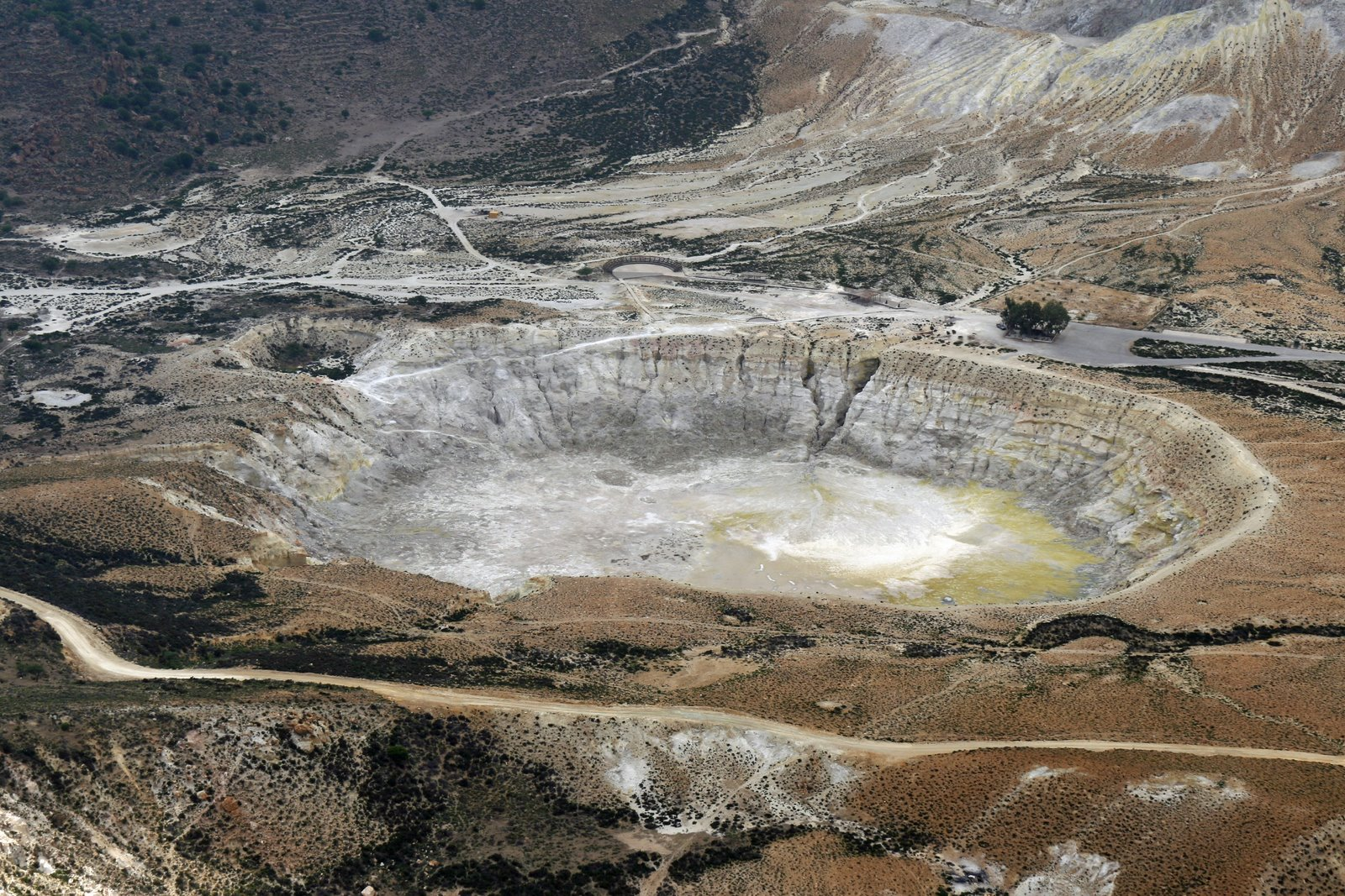 Wulkan - Nissiros - krater Stefanos